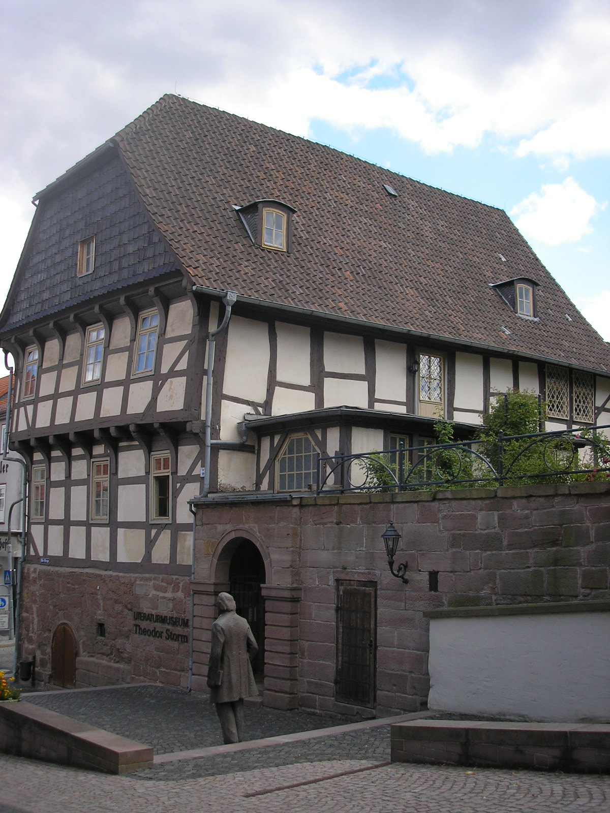 Das Theodor-Storm-Museum in Heiligenstadt (Thüringen).